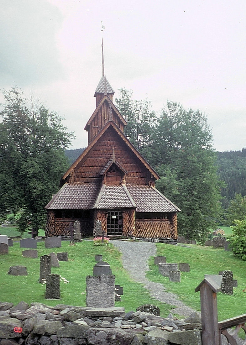 Eidsborg Stavkirke, Telemark, Norway